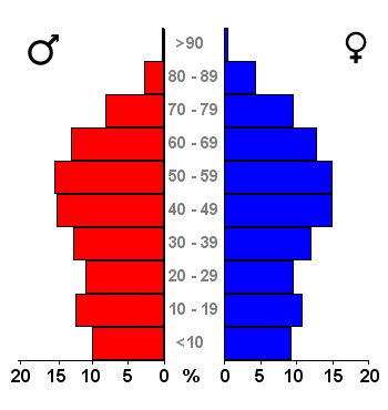 Age pyramids for the 443 municipalities in the Netherlands. Data 2007. Statistics provided by Centraal Bureau voor de Statistiek, Voorburg/Heerlen. Source: Tabel: Bevolking Nederland per gemeente en diverse regio's naar leeftijd, geslacht en burgerlijke staat, 1 januari 1988-2007. Gewijzigd op 24 mei 2007 (on-line database StatLine) Bevolkingspiramide - Gemeente Ridderkerk (2007).png